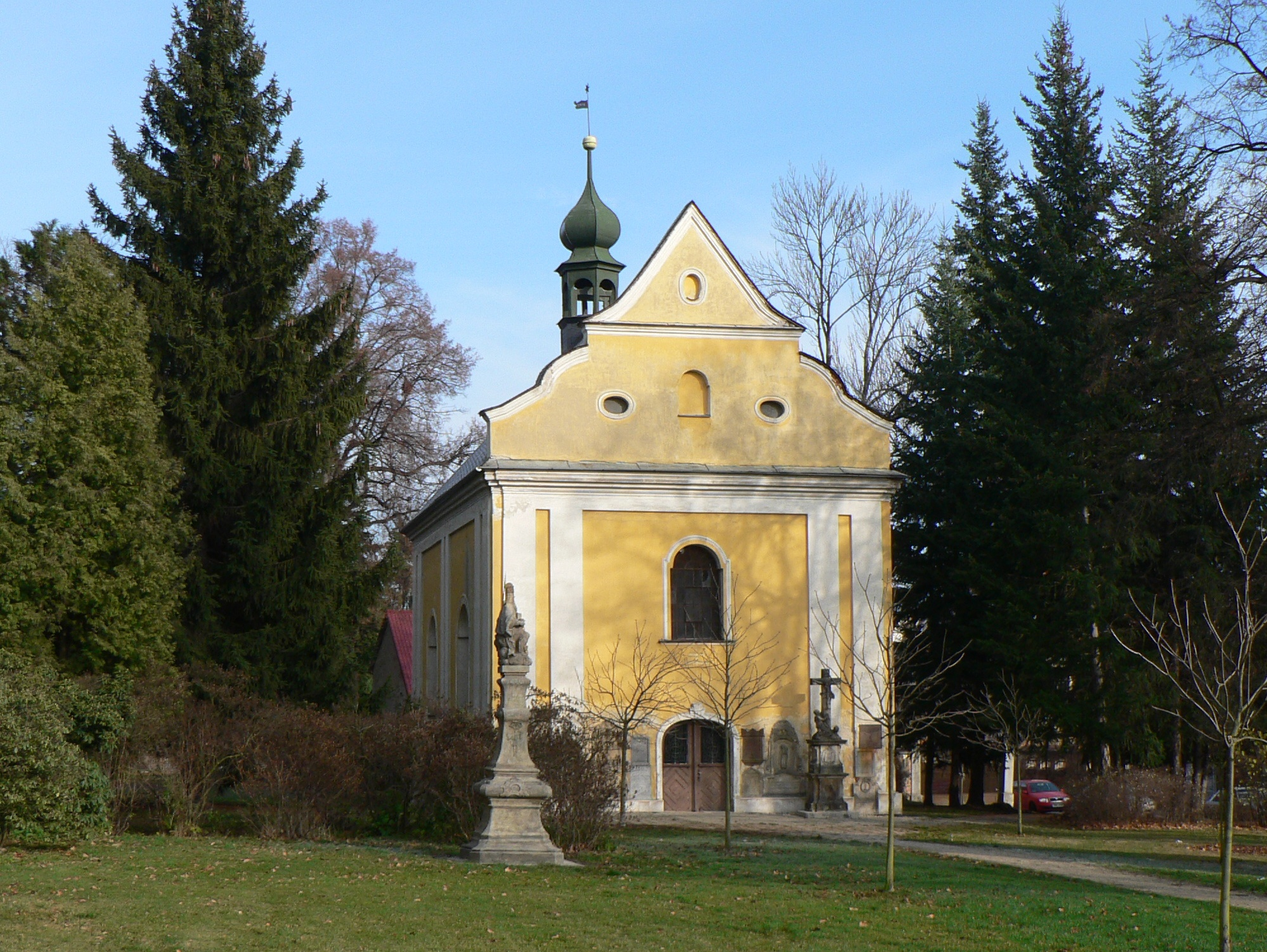 Kostel svaté Barbory (Šumperk)